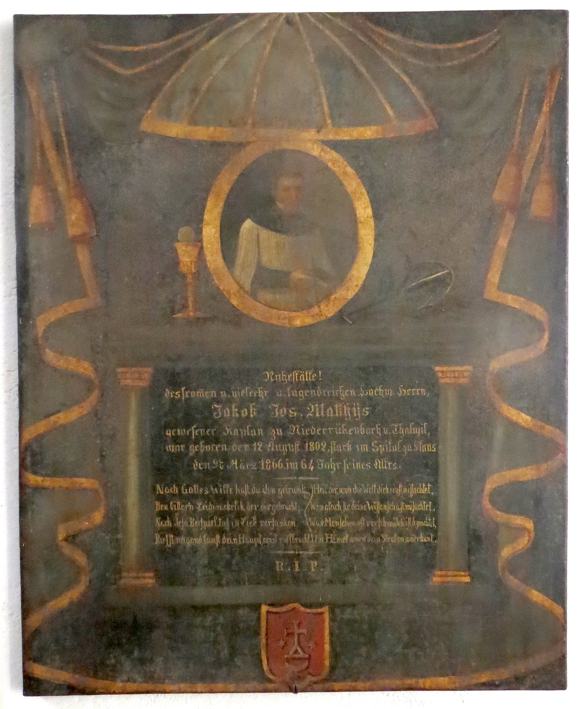 Grabtafel für den Kaplan, Dialektologen und Sprachenkenner Jakob Joseph Matthys (1802–1866) in Wolfenschiessen, Nidwalden (heute im Beinhaus)